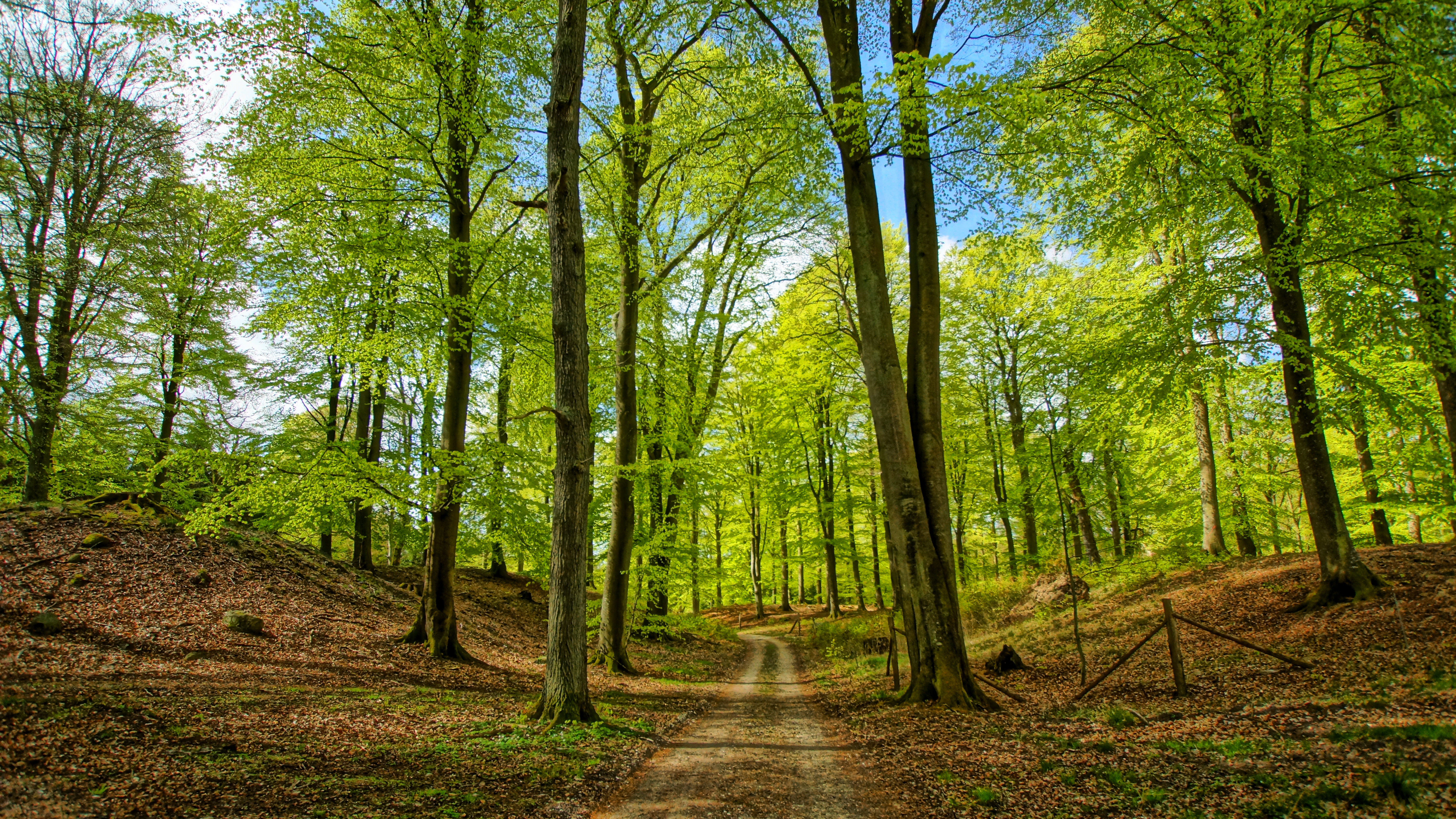 Fjeld Skov, forår 2015, nyudsprunget bøg